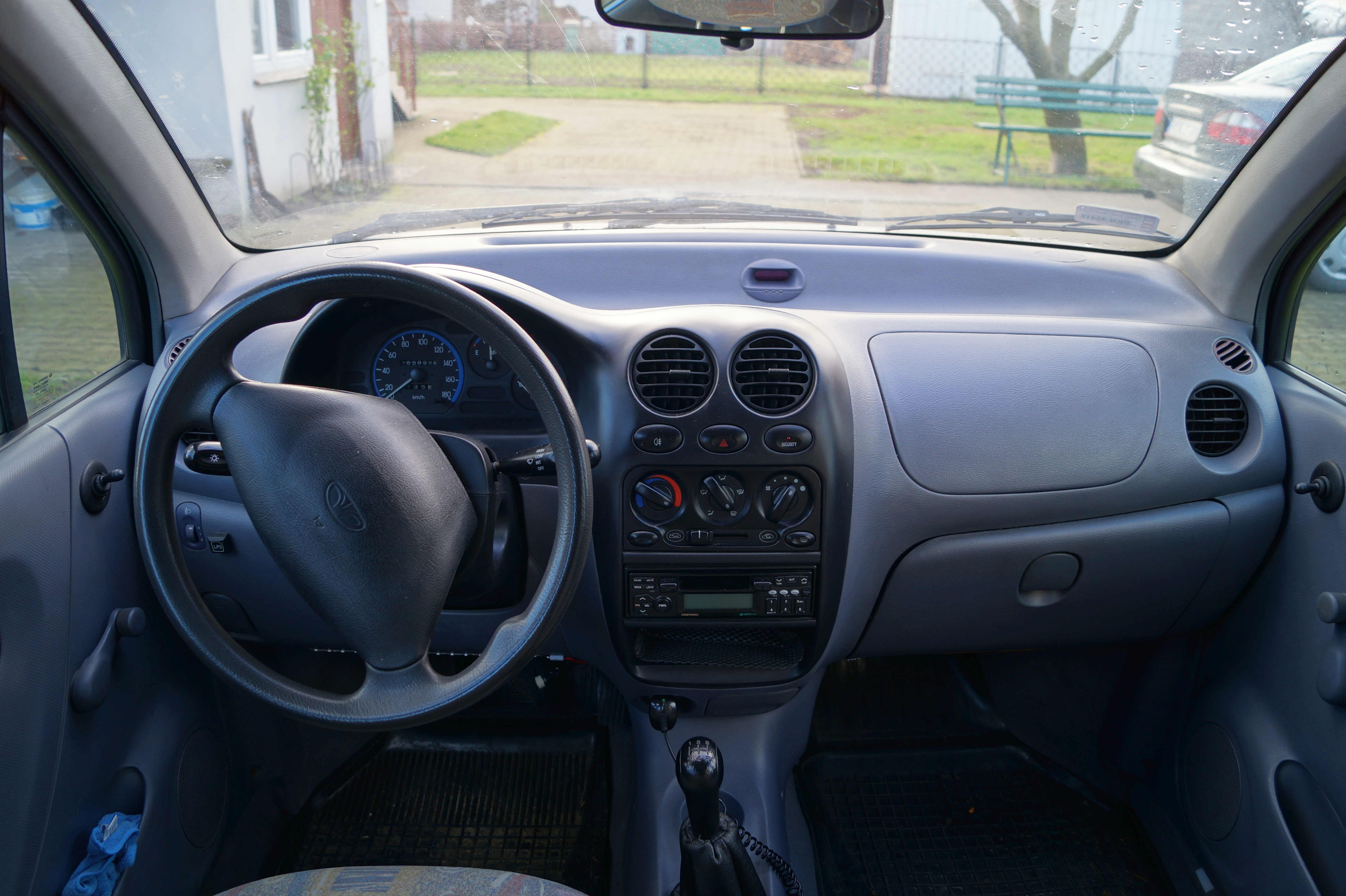 Deska rozdzielcza Daewoo Matiza M100 w wersji Life